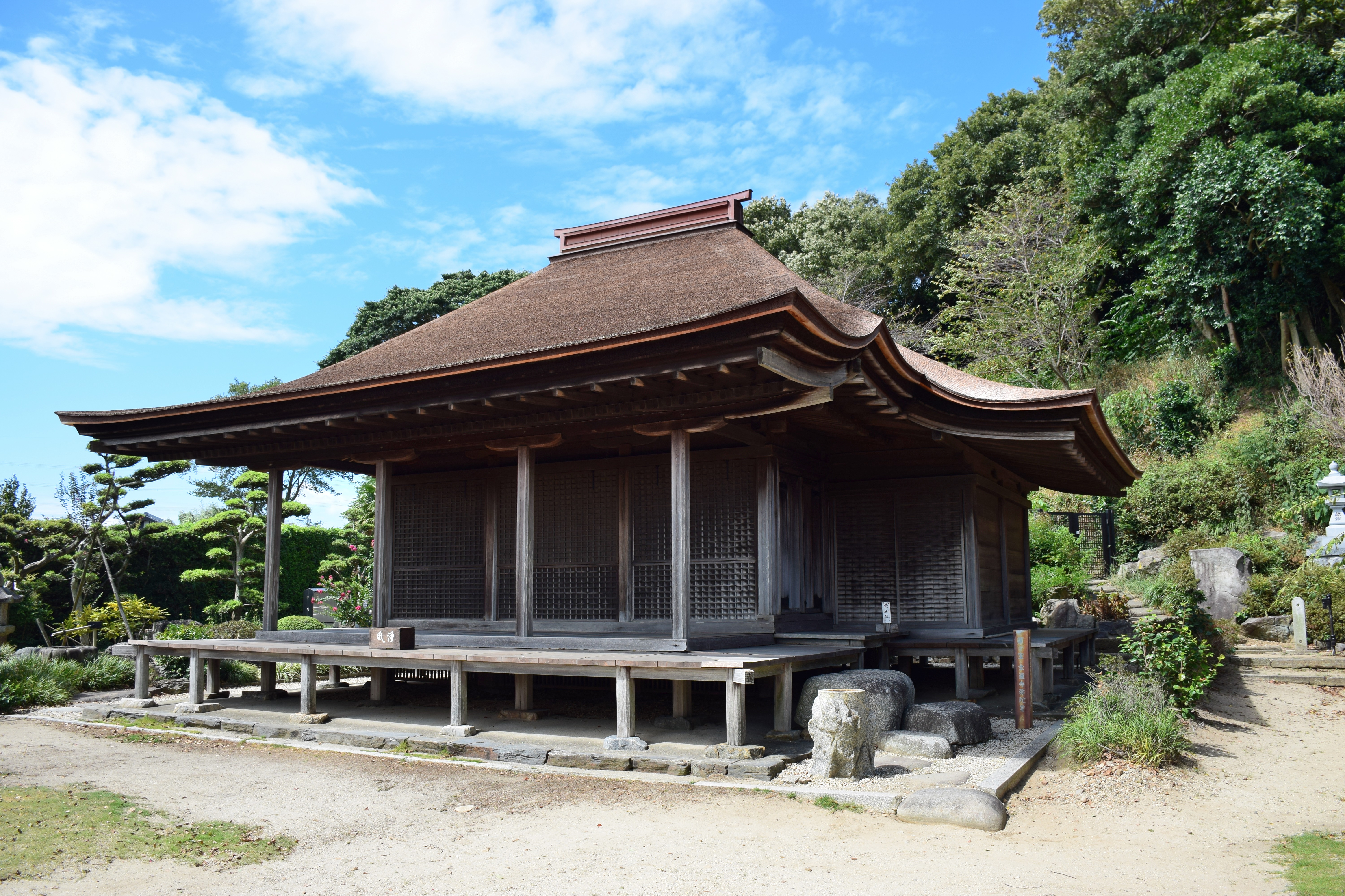 金蓮寺の弥陀堂